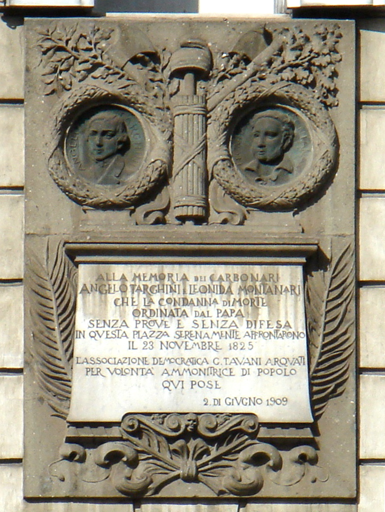 Roma, piazza del Popolo, Caserma Acqua. Lapide in memoria dei carbonari Angelo Targhini e Leonida Montanari, fatti giustiziare dal papa-re nel 1825.